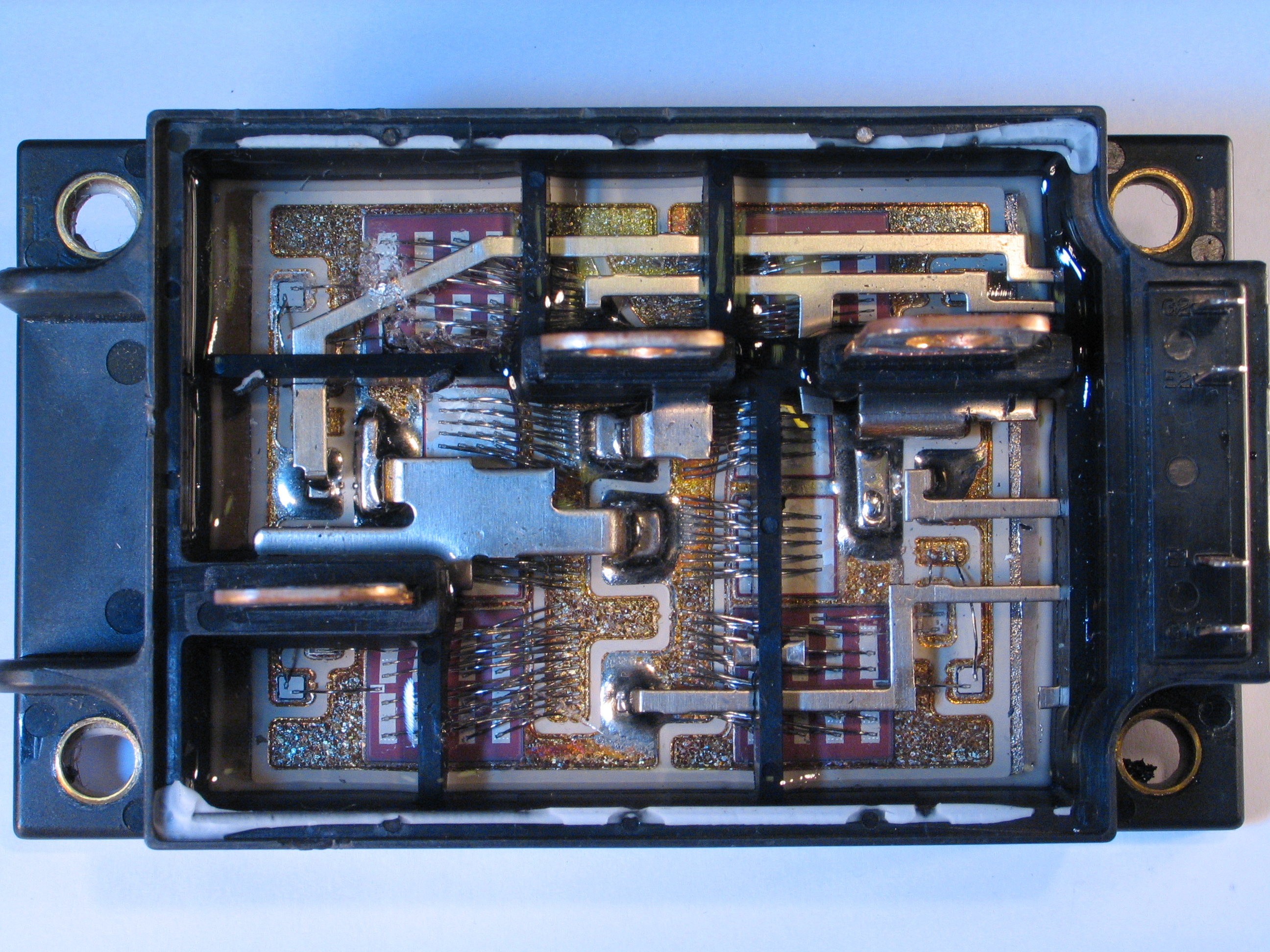 l'intérieur d'un module (bras de pont, c'est-à-dire une moitié de pont en H) IGBT 400 A/ 600 V, technologie PT, incluant 2 × 2 IGBT en parallèle et 2 × 2 diodes en parallèle ainsi que les circuits de protection de gate et de surintensité.